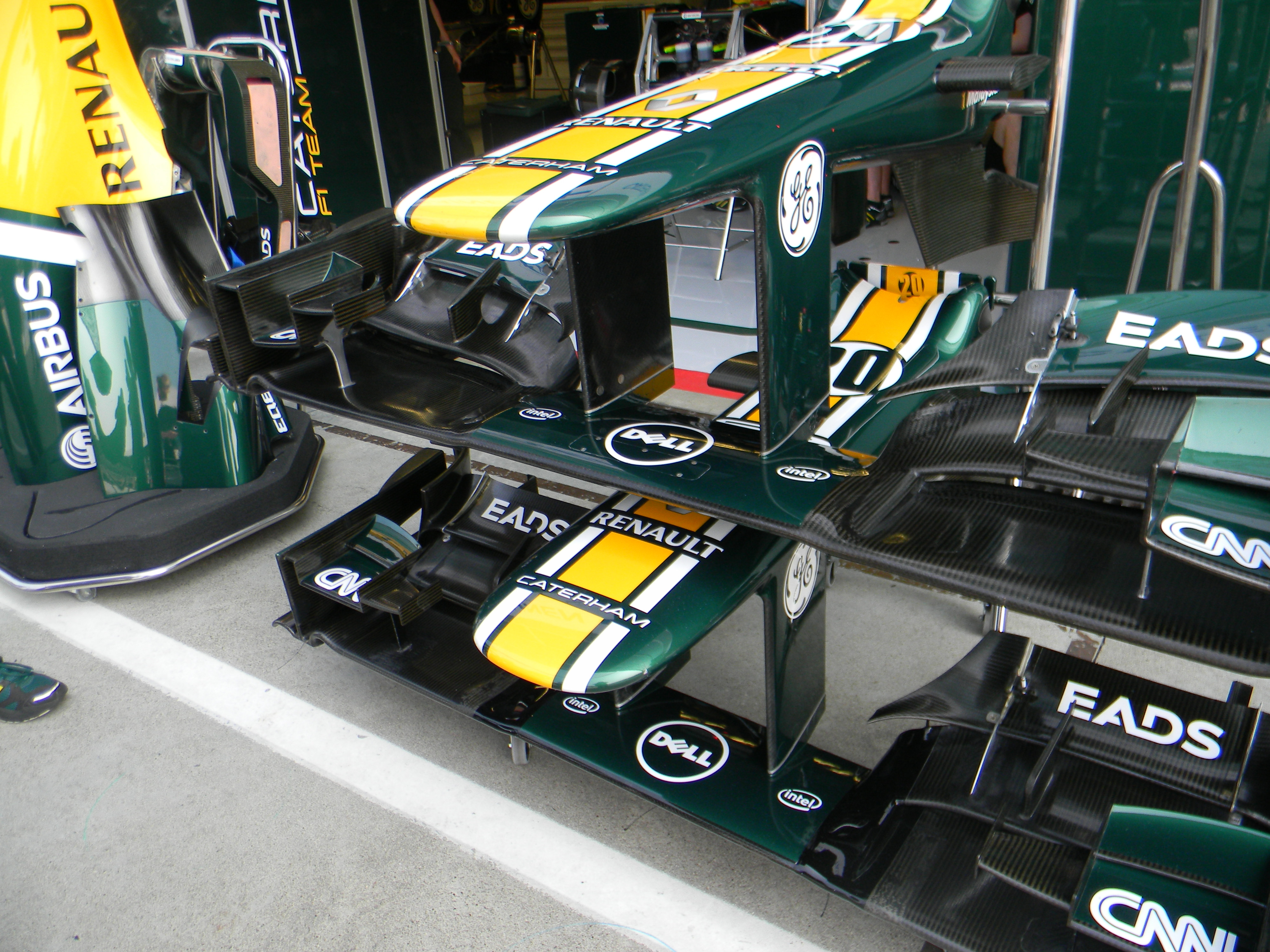 Museau caterham Italie 2012